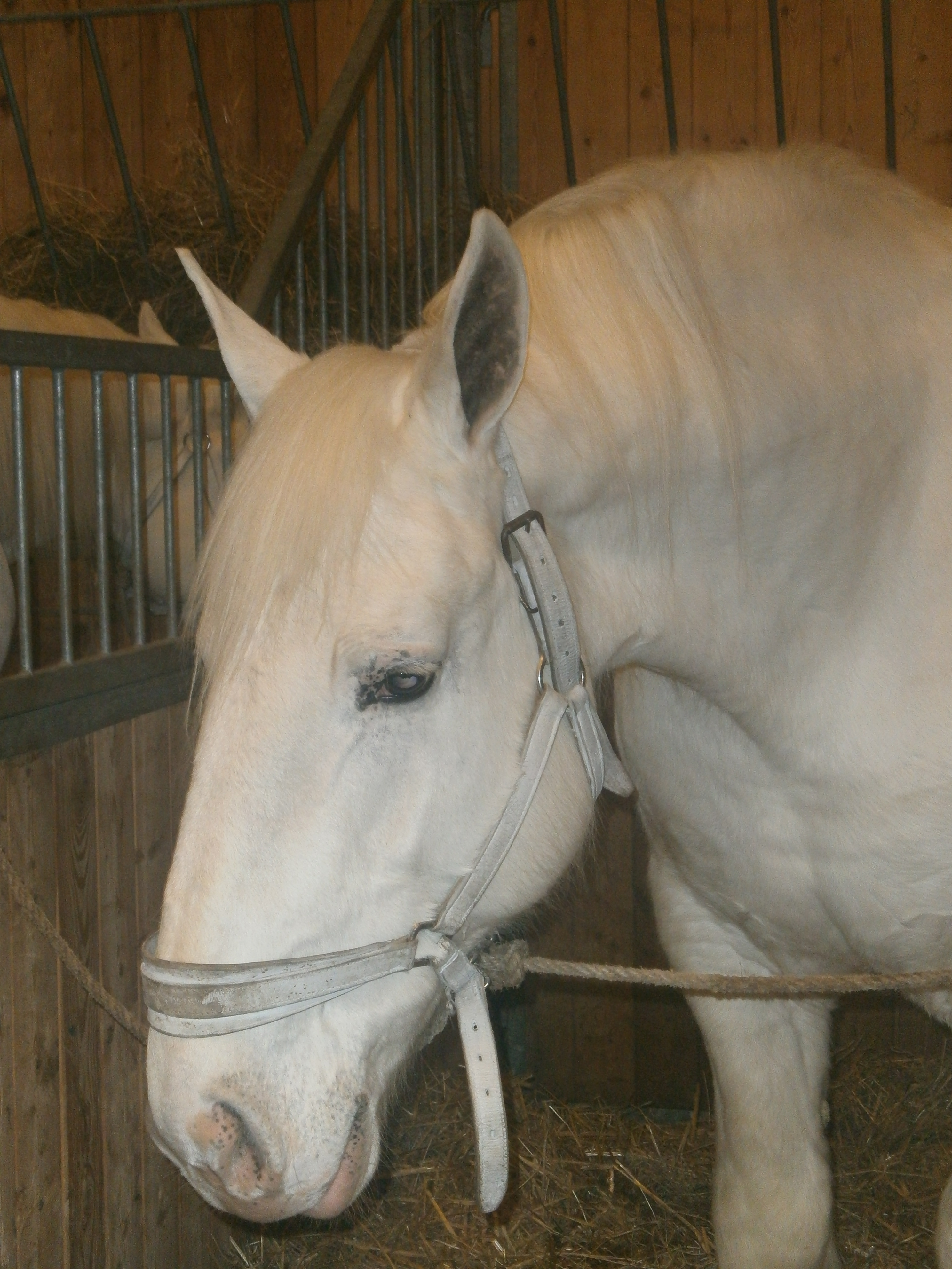 Cheval boulonnais au salon de l'agriculture 2013